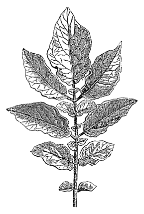 unpaarig gefiedertes Blatt